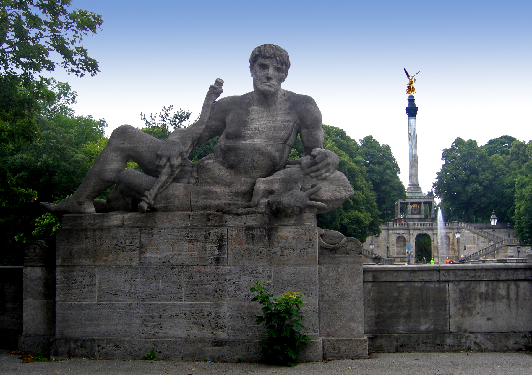 Liegeskulptur "Jäger" (1901) von Hermann Hahn an der Luitpoldbrücke, München als Symbol für Altbayern. 1954 von Joseph Wackerle erneuert.